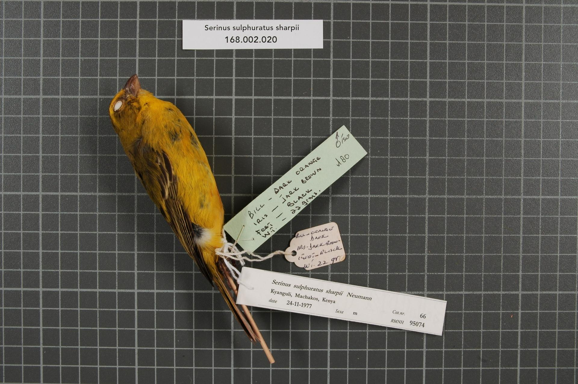 Serinus sulphuratus sharpii Neumann, 1900